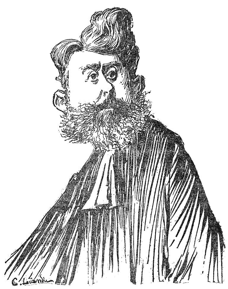 "M. Michelin".